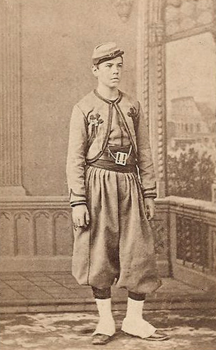 Jules Marie DELUEN (1849-1918) en tenue de Zouave Pontifical